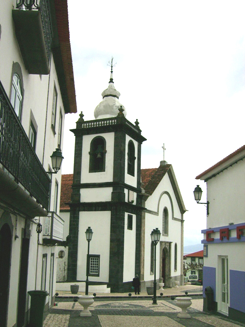 Igreja de São Jorge, Matriz das Velas, rua direita velas, ilha de São Jorge, Açores, Portugal